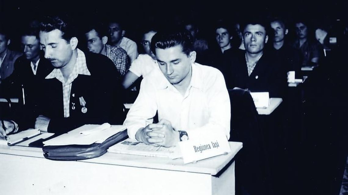 Ion Iliescu la o adunare a Uniunii Tineretului Comunist, sfârșitul anilor ’50